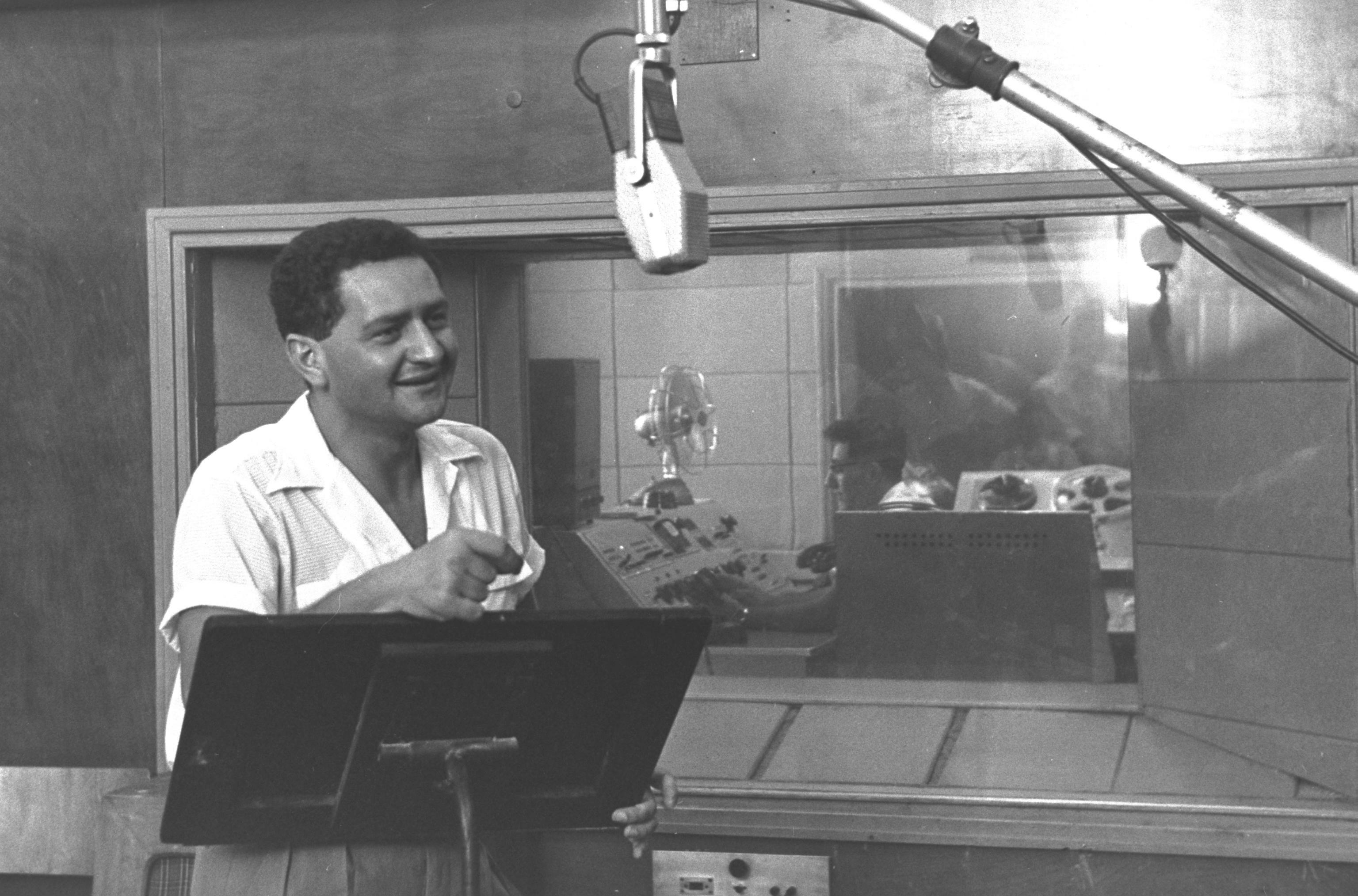 שמעון ישראלי באולפני קול ישראל